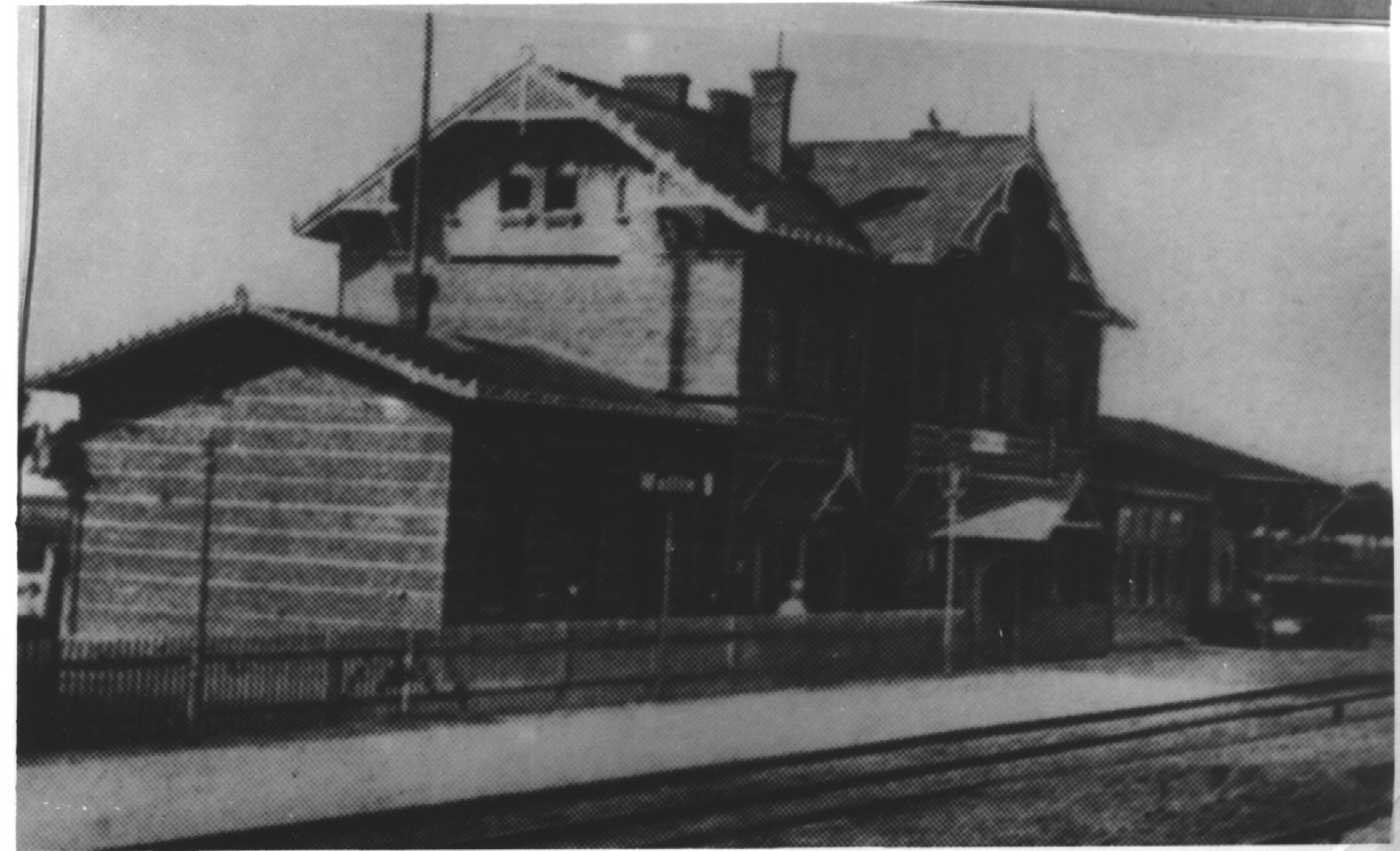 Stacja kolejowa przed II wojną światową